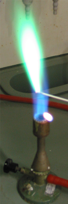 Flame test Kupfer, grün, auch blau